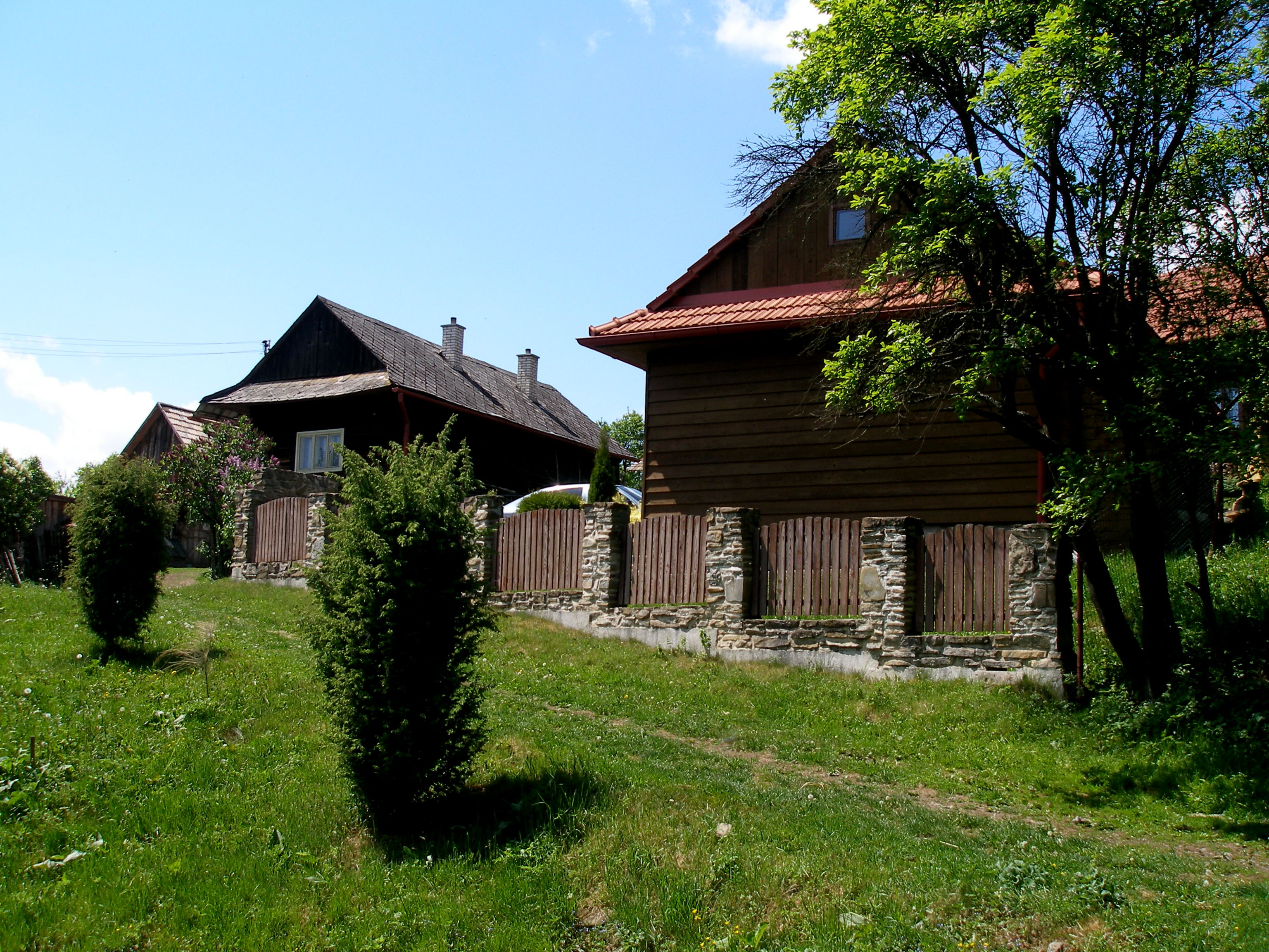 Obec Hanigovce okres Sabinov.